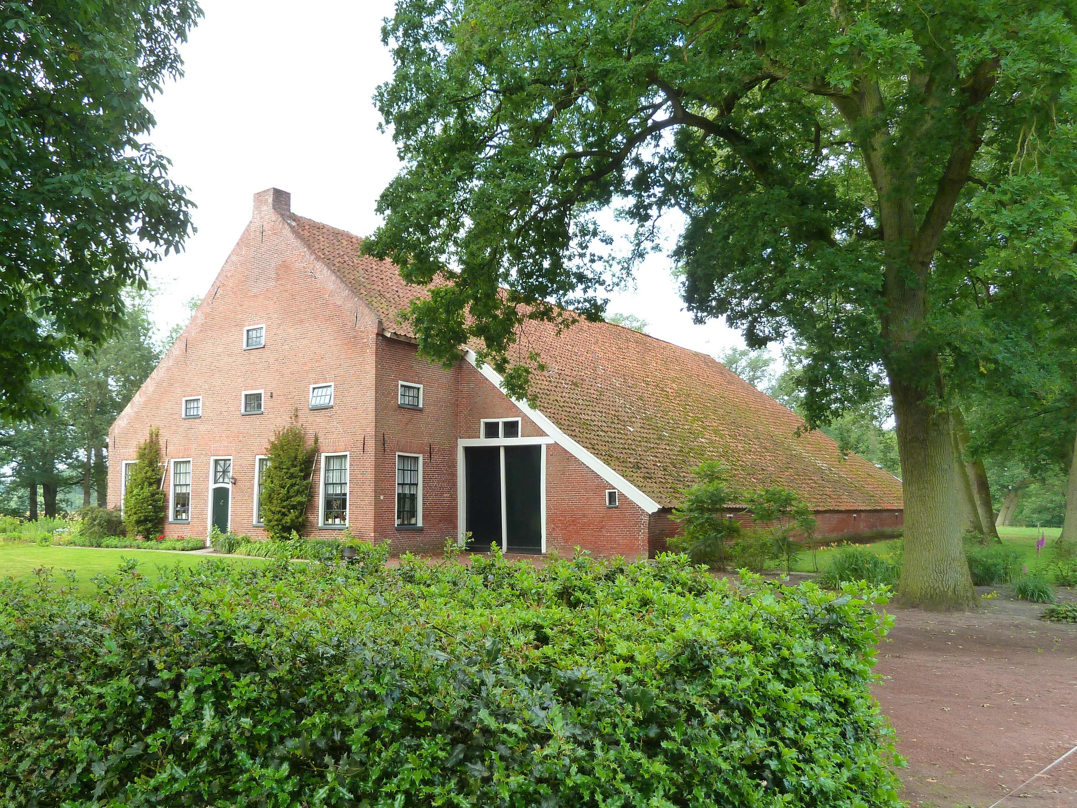 Grote boerderij met voorhuis dat even breed is als de schuur en met bakhuis aan de Borgerweg 3 in Ter Borg (Vlagtwedde, Groningen, Nederland).